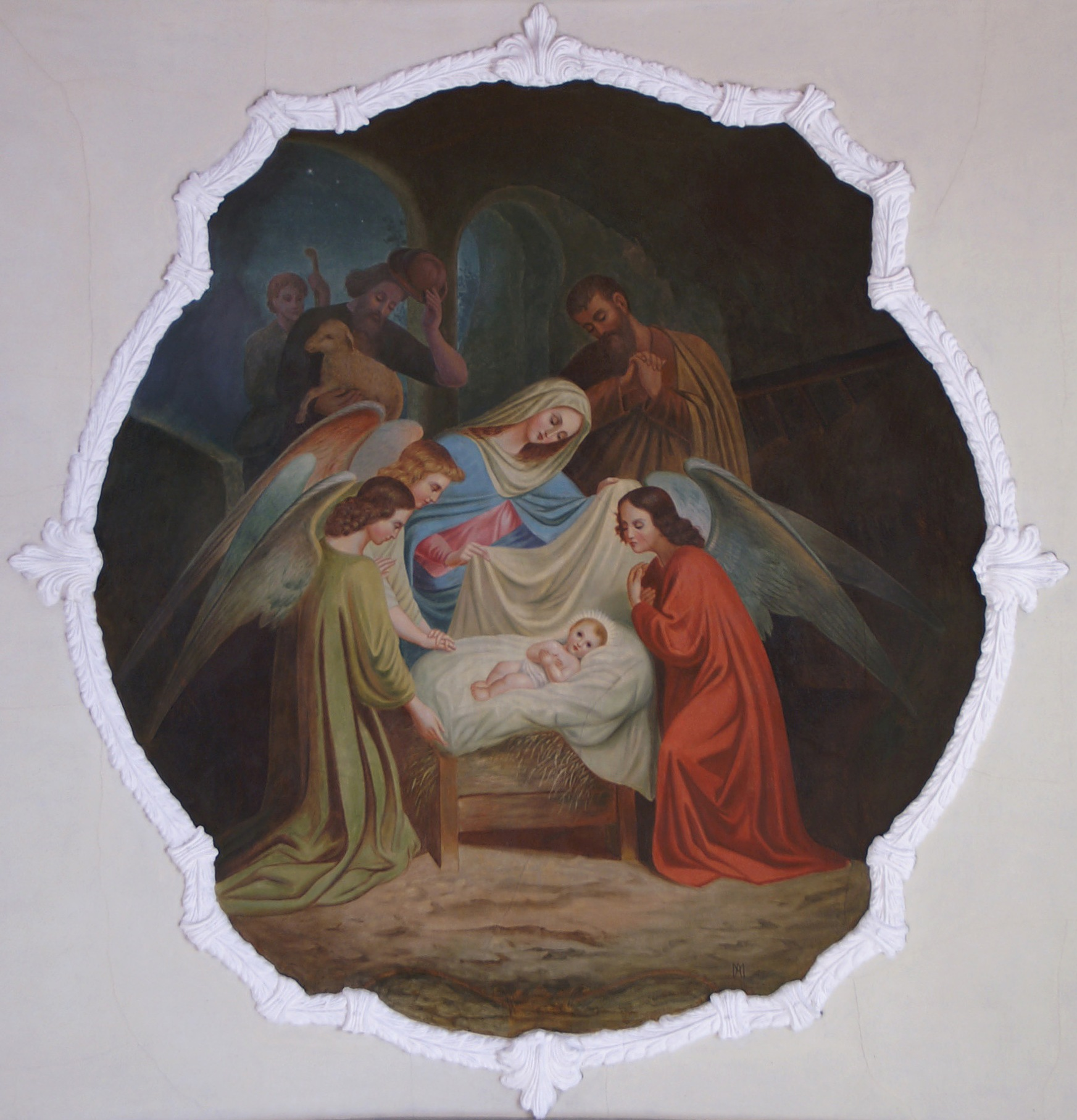 Deckenfresko von Anton Marte 1908; 1954 Restauriert durch A.Hummer. In der Kirche hl. Josef in Egg, Großdorf.